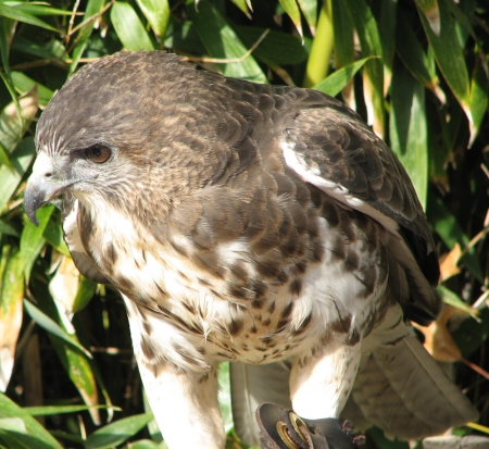 Hawaiian Hawk - Buteo solitarius